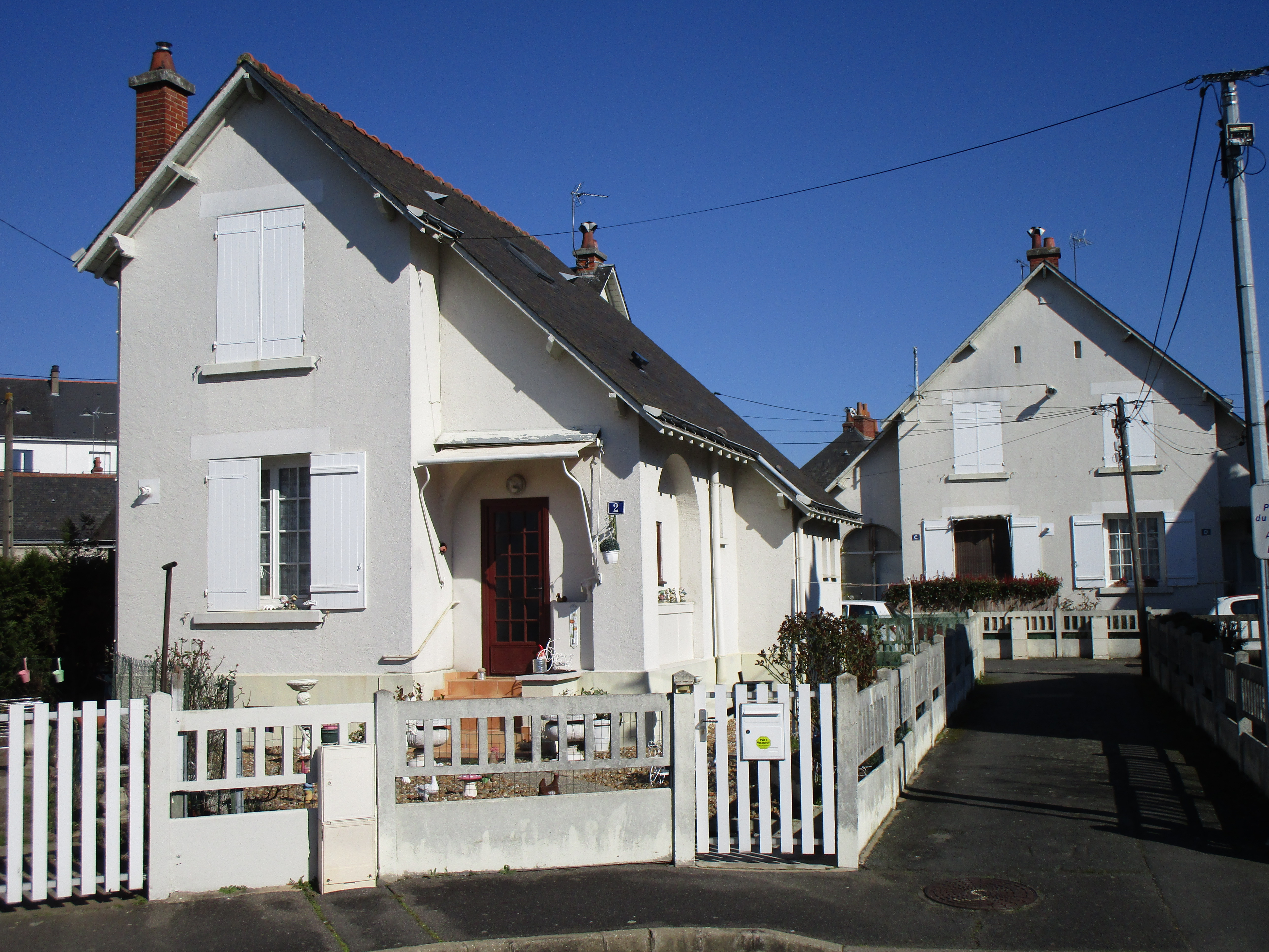 Maison de la cité Jolivet, quartier La Fuye-Velpeau, à Tours